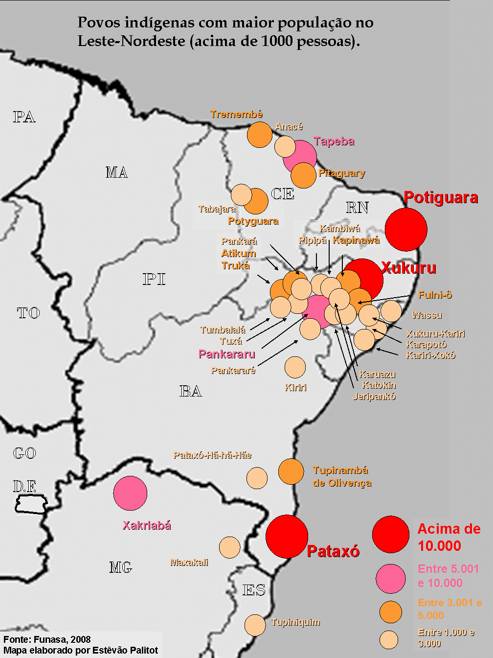 Etnias indígenas no Leste-Nordeste com maior população segundo dados da FUNASA 2008.